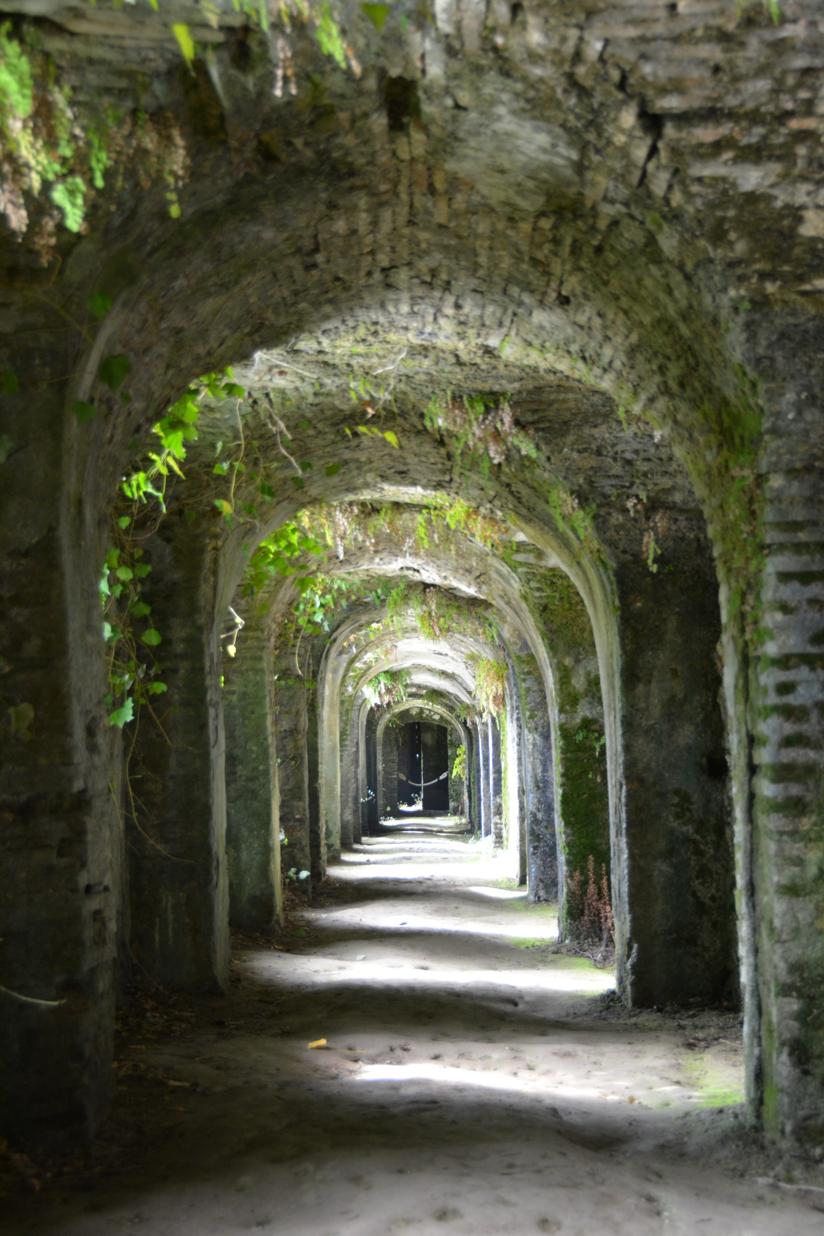 Crytoportique de l'Abbaye Saint-Jean de Sorde abritant les granges batelières face au gave d'Oloron